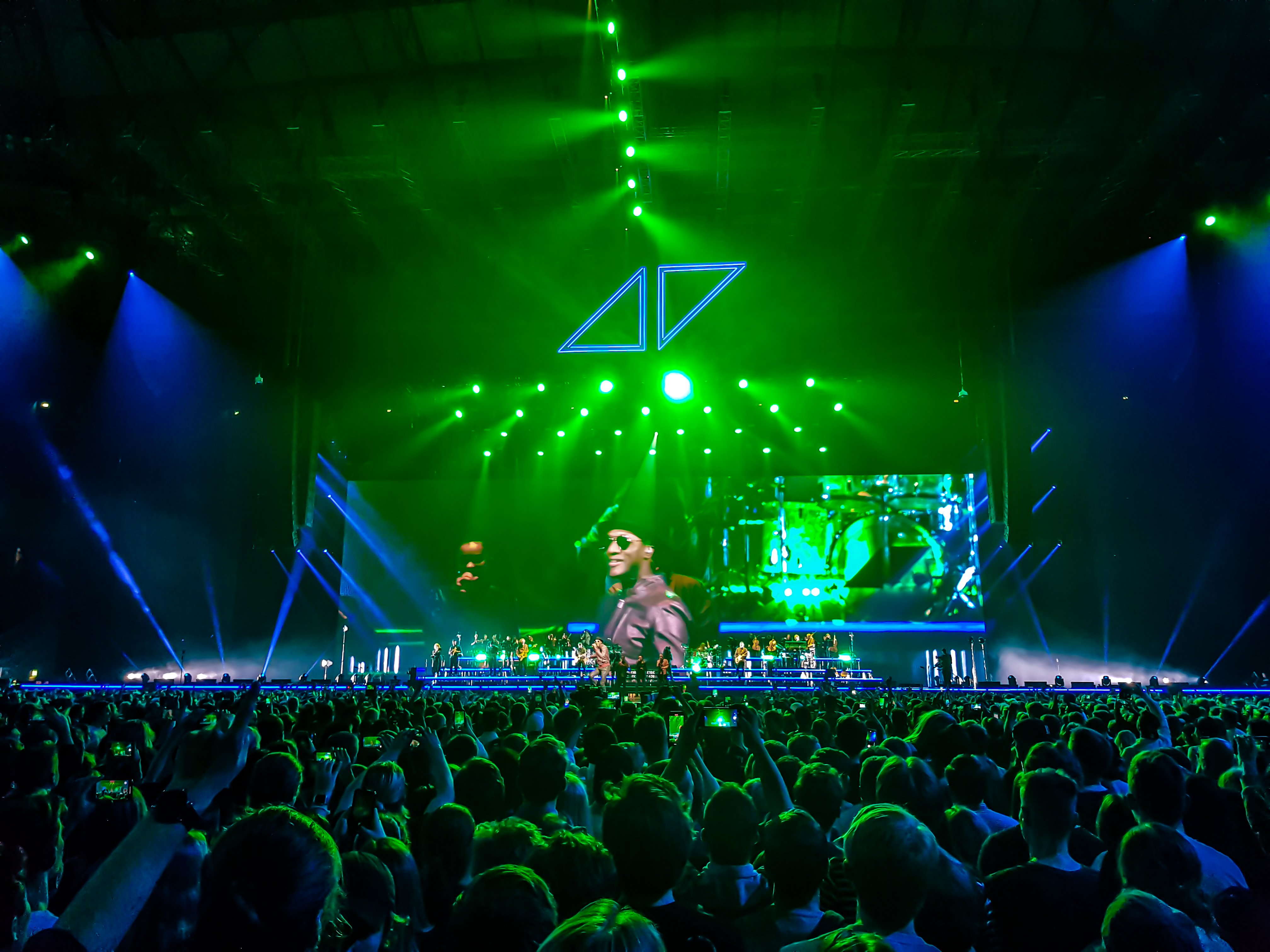 Avicii Tribute Concert Aloe Blacc